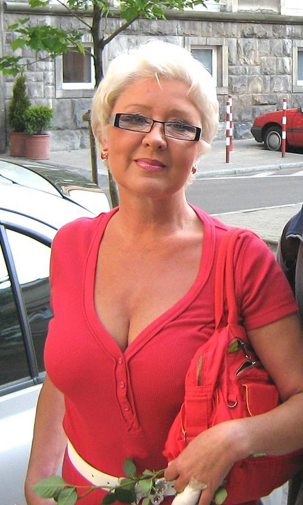 Ewa Borowik (ur. 28 sierpnia 1950 w Warszawie) - polska aktorka.